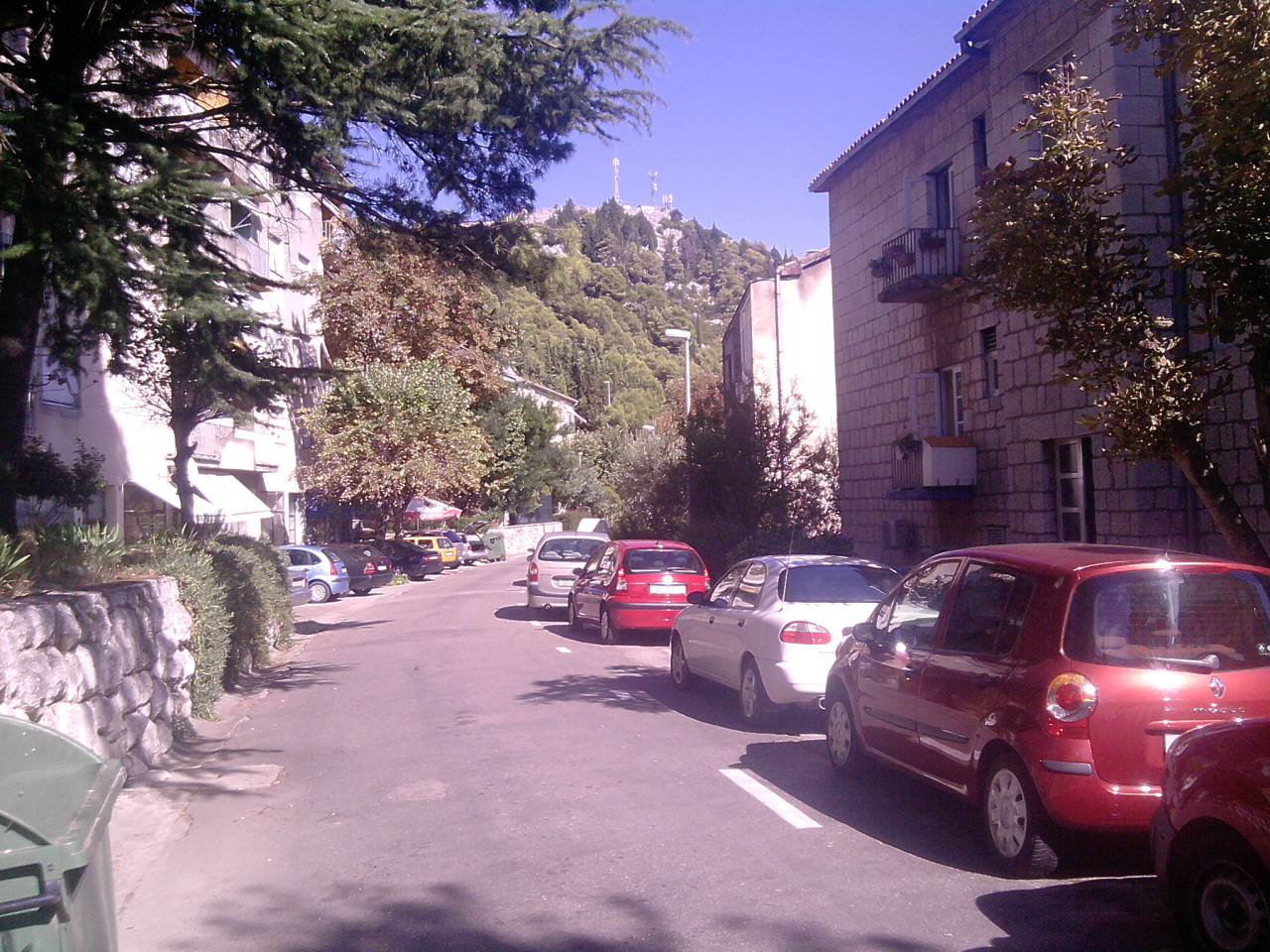 Ploče naselje